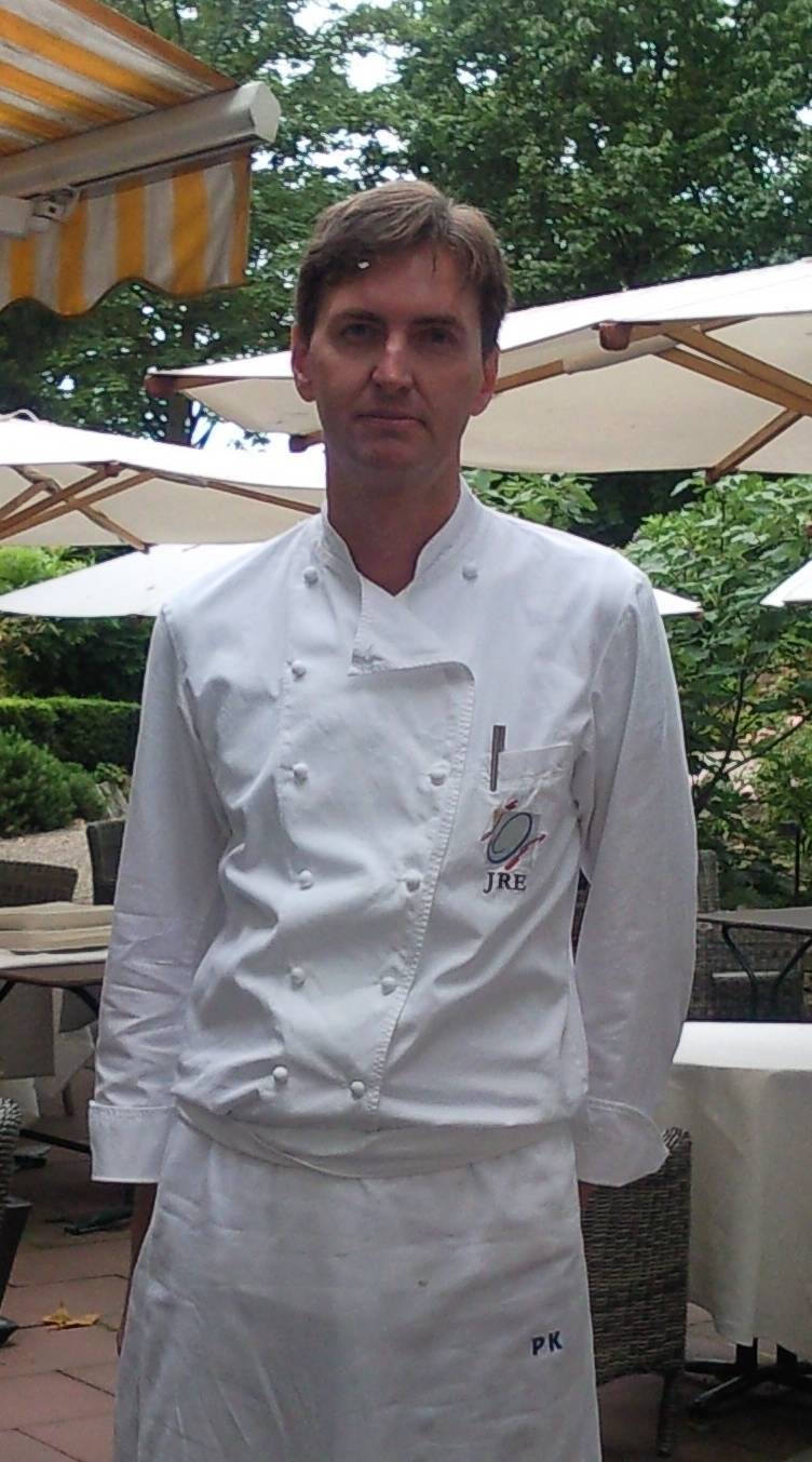 Patrik Kimpel 2012 im Garten des Kronenschlösschens